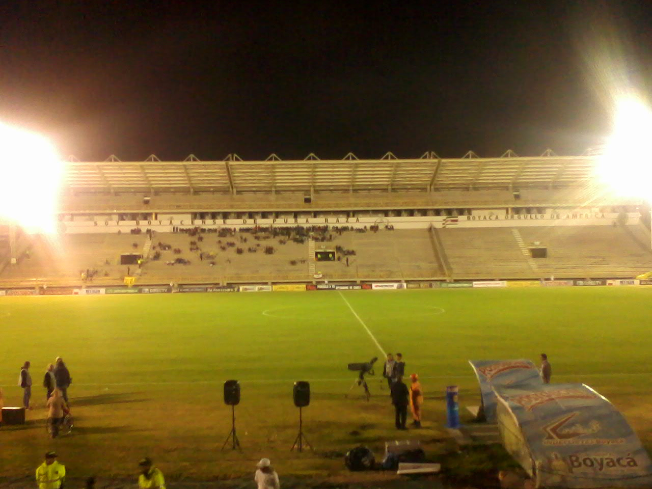 Esta foto tomada por mi camara de telefono celular un Samsung C-3310 regista una imagen de un partido de fútbol en el Estadio de la Independencia de la Ciudad de Tunja, Boyacá, Colombia.